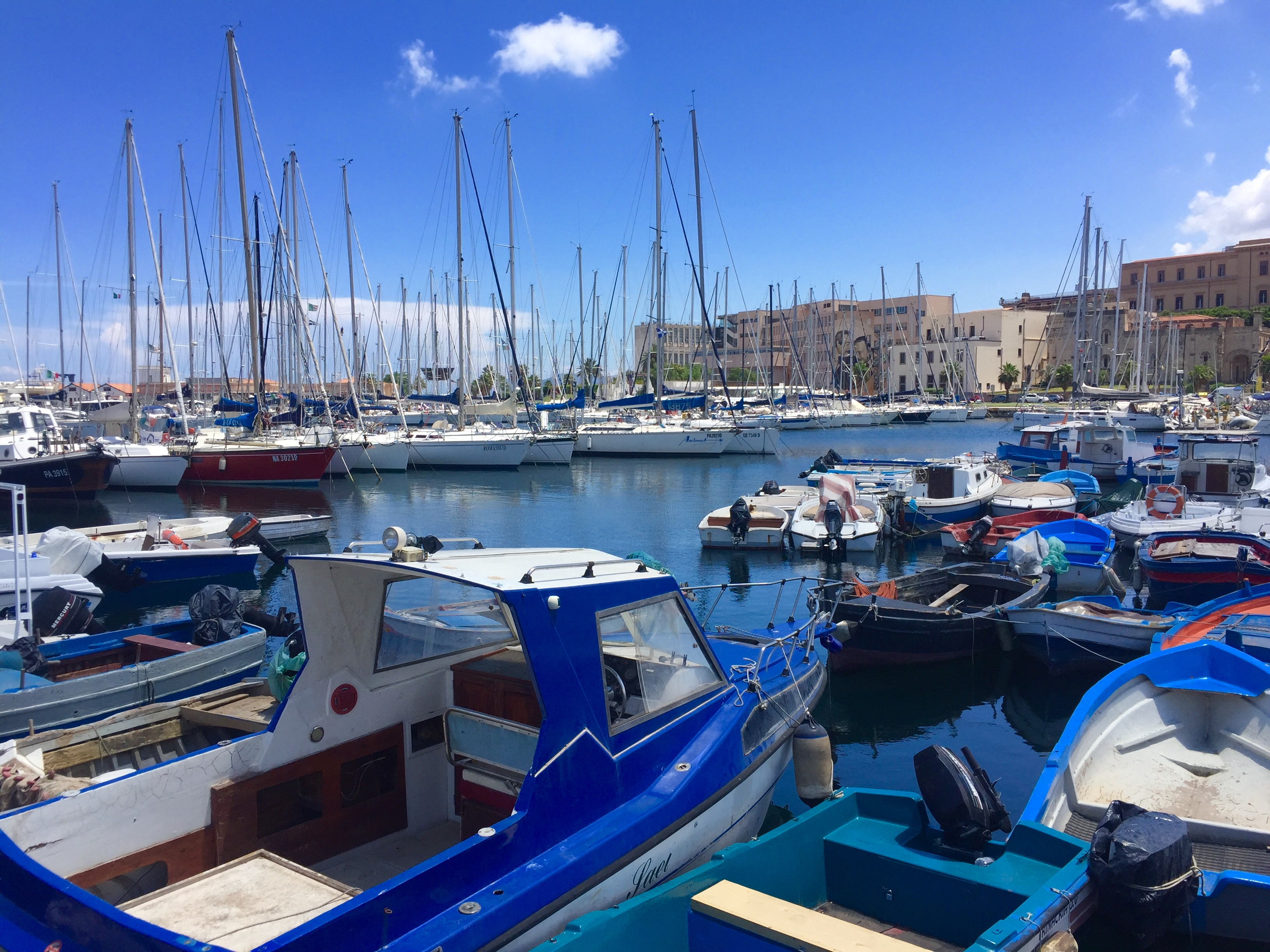 Porticciolo turistico - La Cala - Palermo